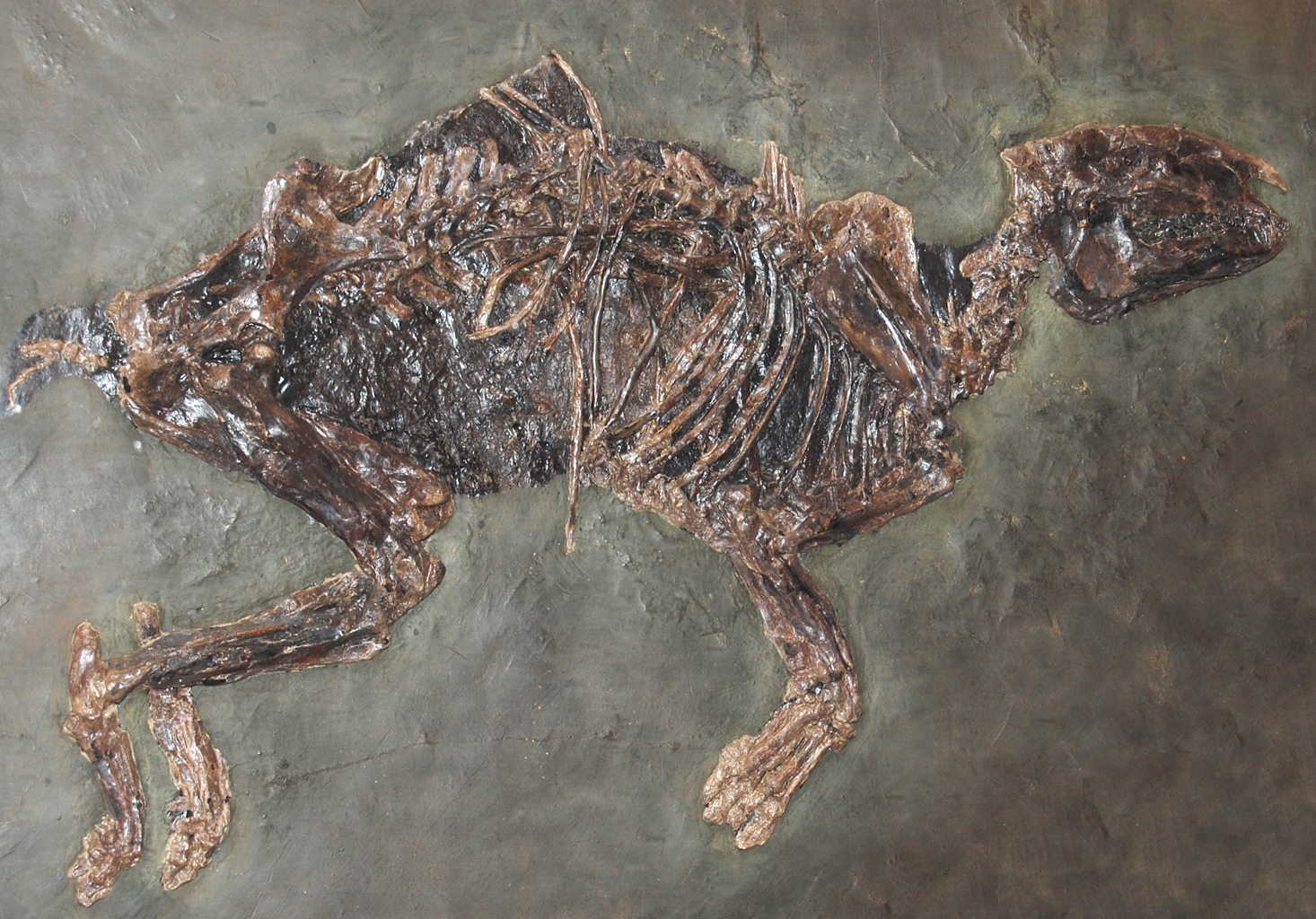 Naturhistorisches Museum Wien